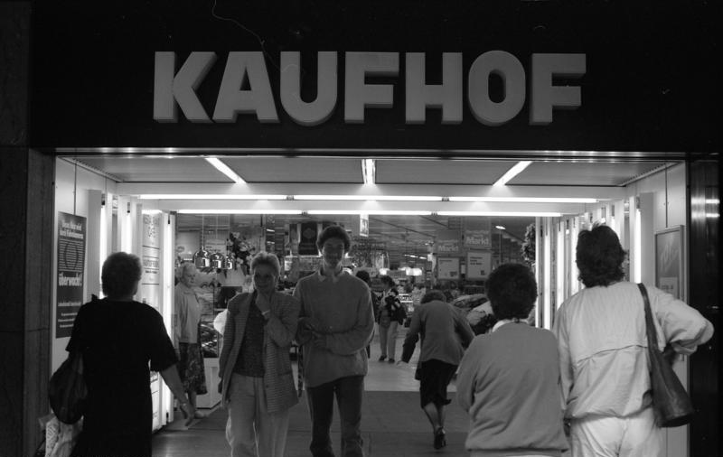 Juni 1988 Bonn, Fußgängerzone